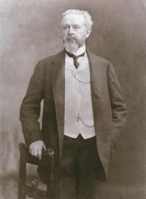 Барон Борис Эдуардович фон Вольф в 1893 году